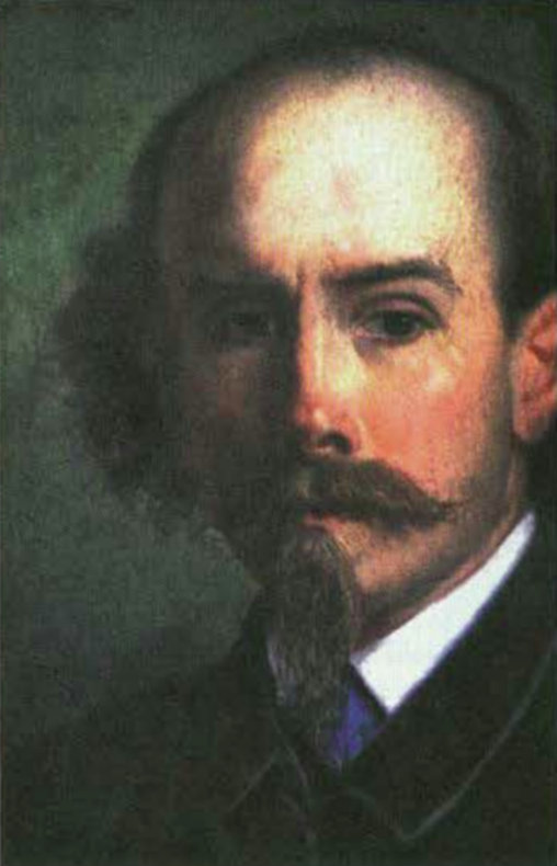 Sujet: Michel Sinner (1826-1882): Selbstportrait Source: Reider, Zäitschrëft vun der Gemeng Ettelbréck